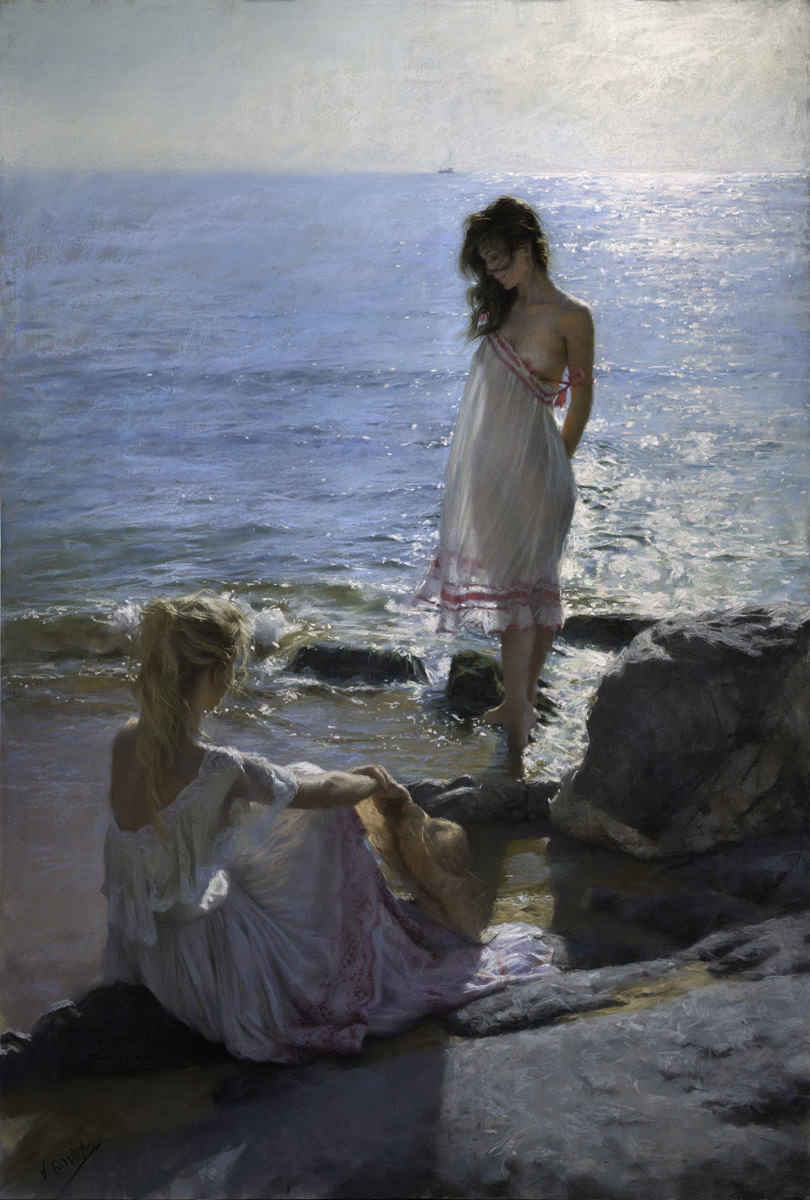 2015. Pastel 110x75 cm